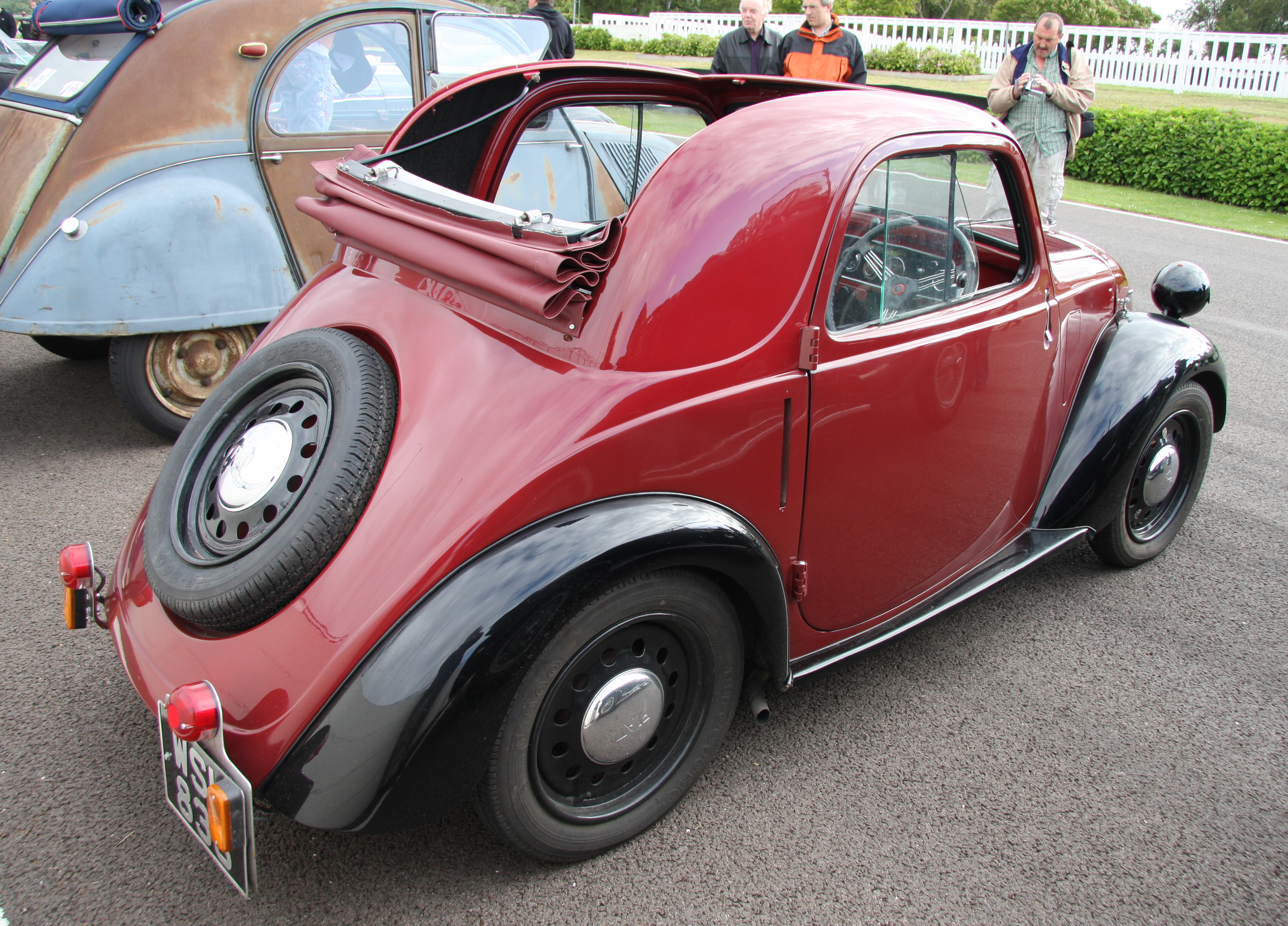 1937 Fiat 500 Topolino